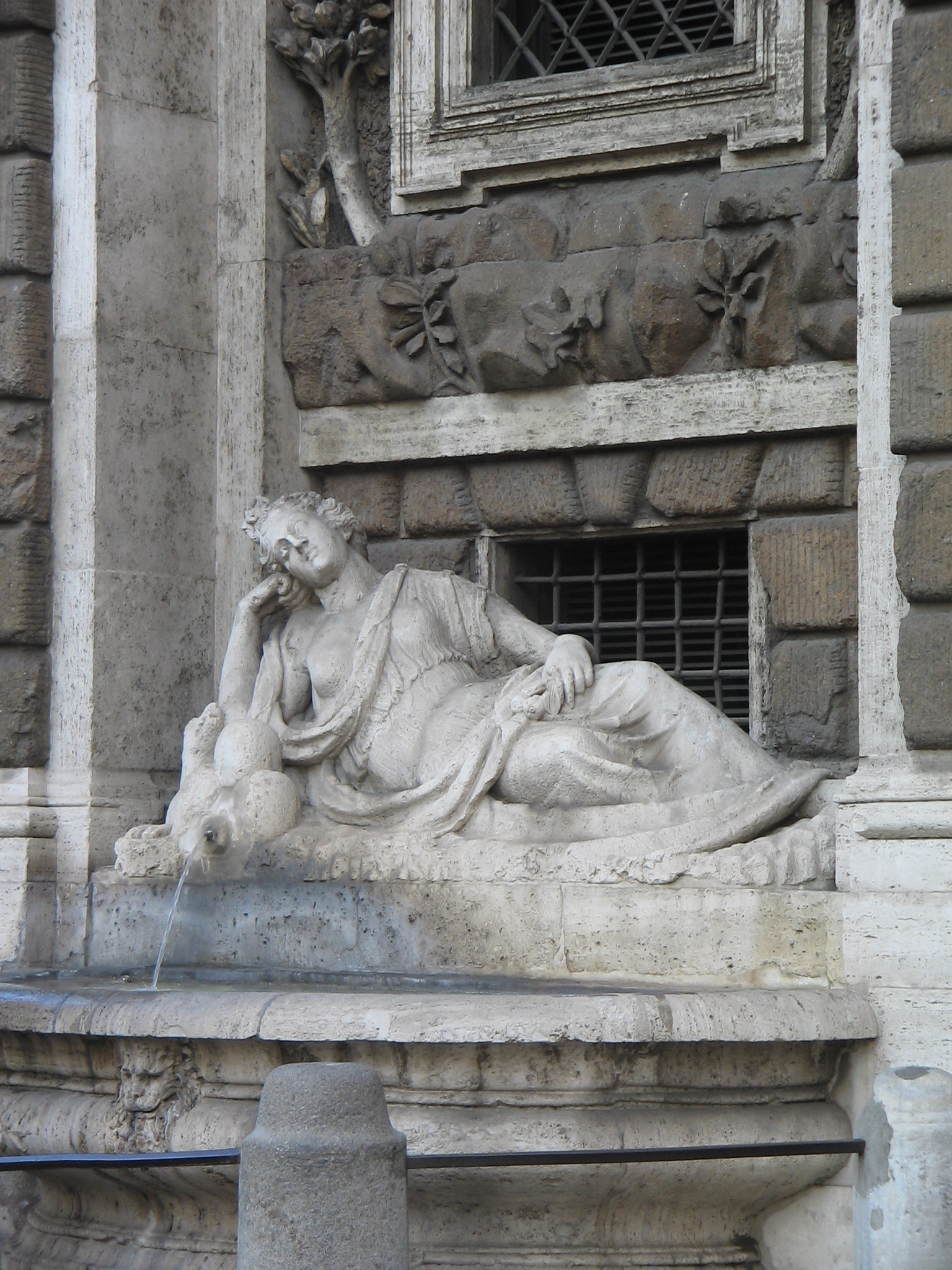 Una delle "Quattro Fontane" di Piazza Quattro Fontane a Roma.